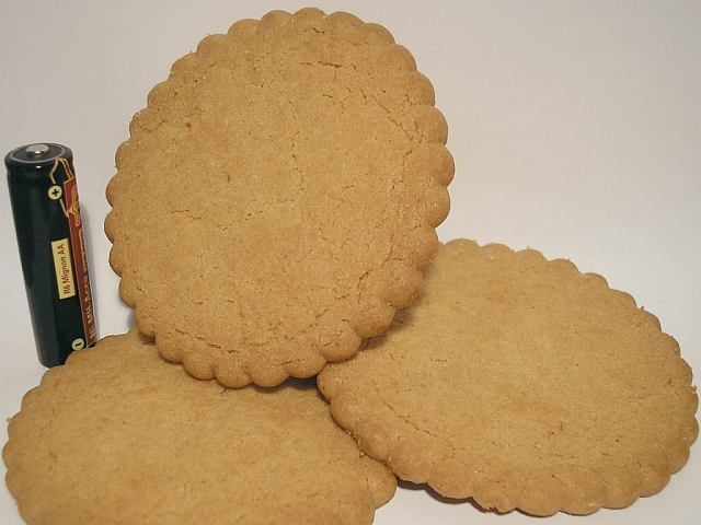 Jodekoeken (AA-batterij voor maat) Voor deze foto stonden model: Drie koeken uit een pak "Original Enkhuizer Jodekoeken (zonder kleur- en kunstmatige smaakstoffen)" van Lotus Bakeries Nederland uit Enkhuizen.